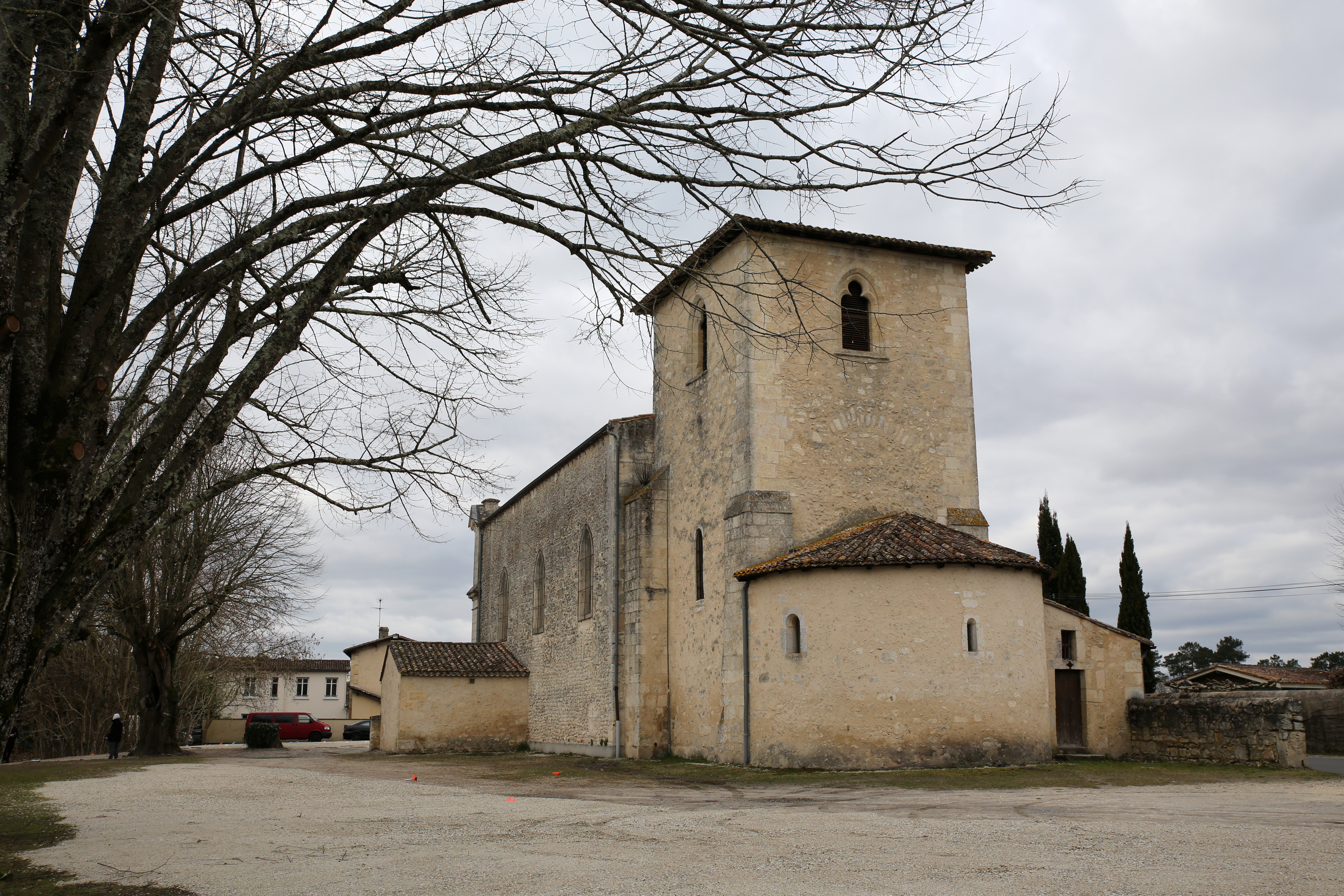 Église romane du Pian.